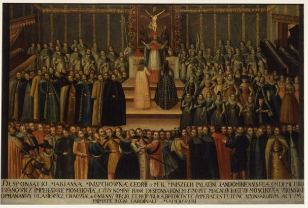 ОБРУЧЕНИЕ МАРИНЫ МНИШЕК В КРАКОВЕ Неизвестный польский художник Первая половина XVII века (?) Холст; масло 155 х 230 Поступил в 1885 году, дар императора Александра III Происходит из польского замка Вишневец, принадлежавшего фамилии Мнишек, который был продан в 1852 году. Один из его новых владельцев И. Толли подарил картину императору Александру III ГИМ инв. 8402 ИI-3469